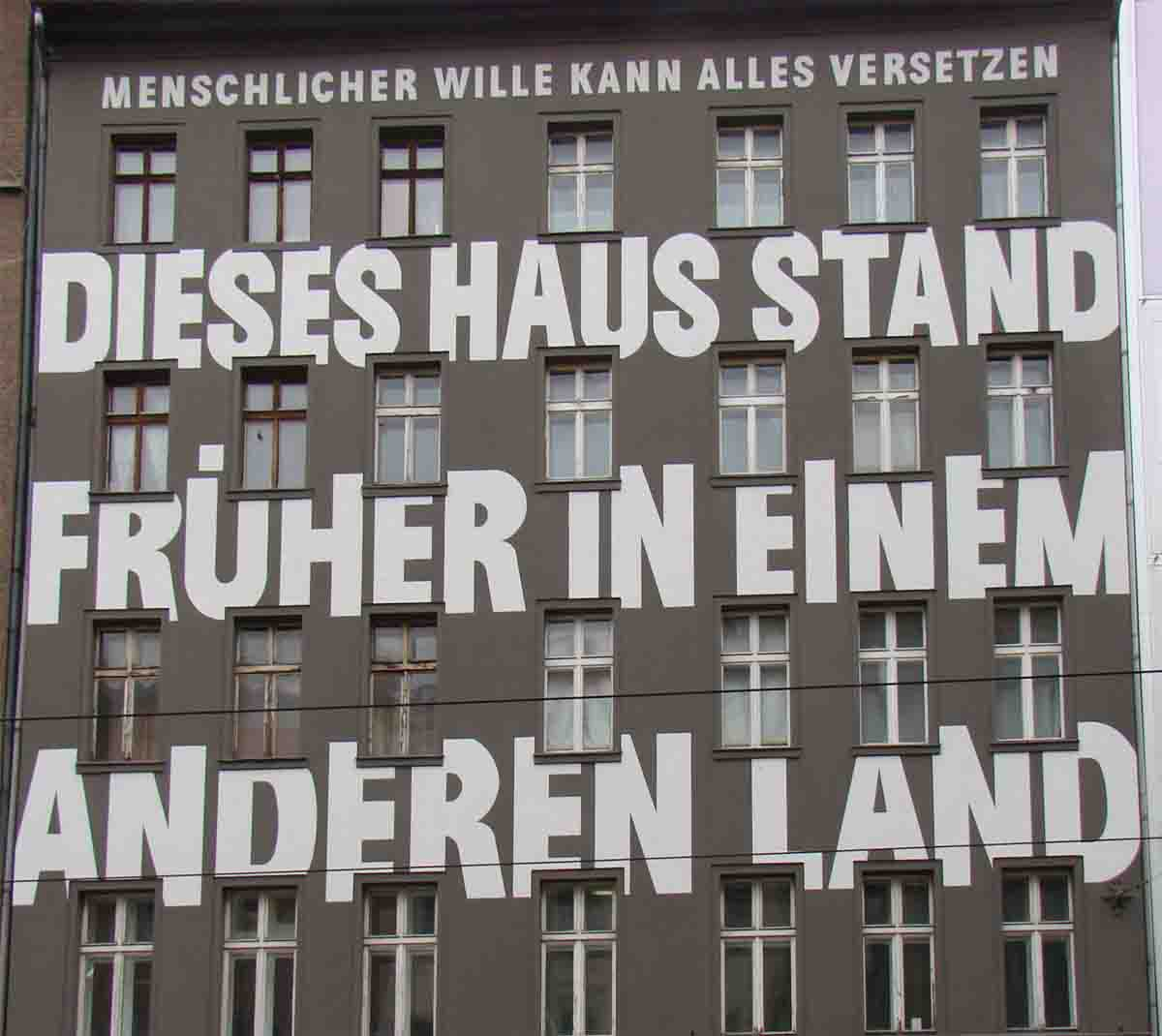 Fassade in der Brunnenstraße, Berlin-Mitte. Gestaltet 2009 von Jean-Remy von Matt.